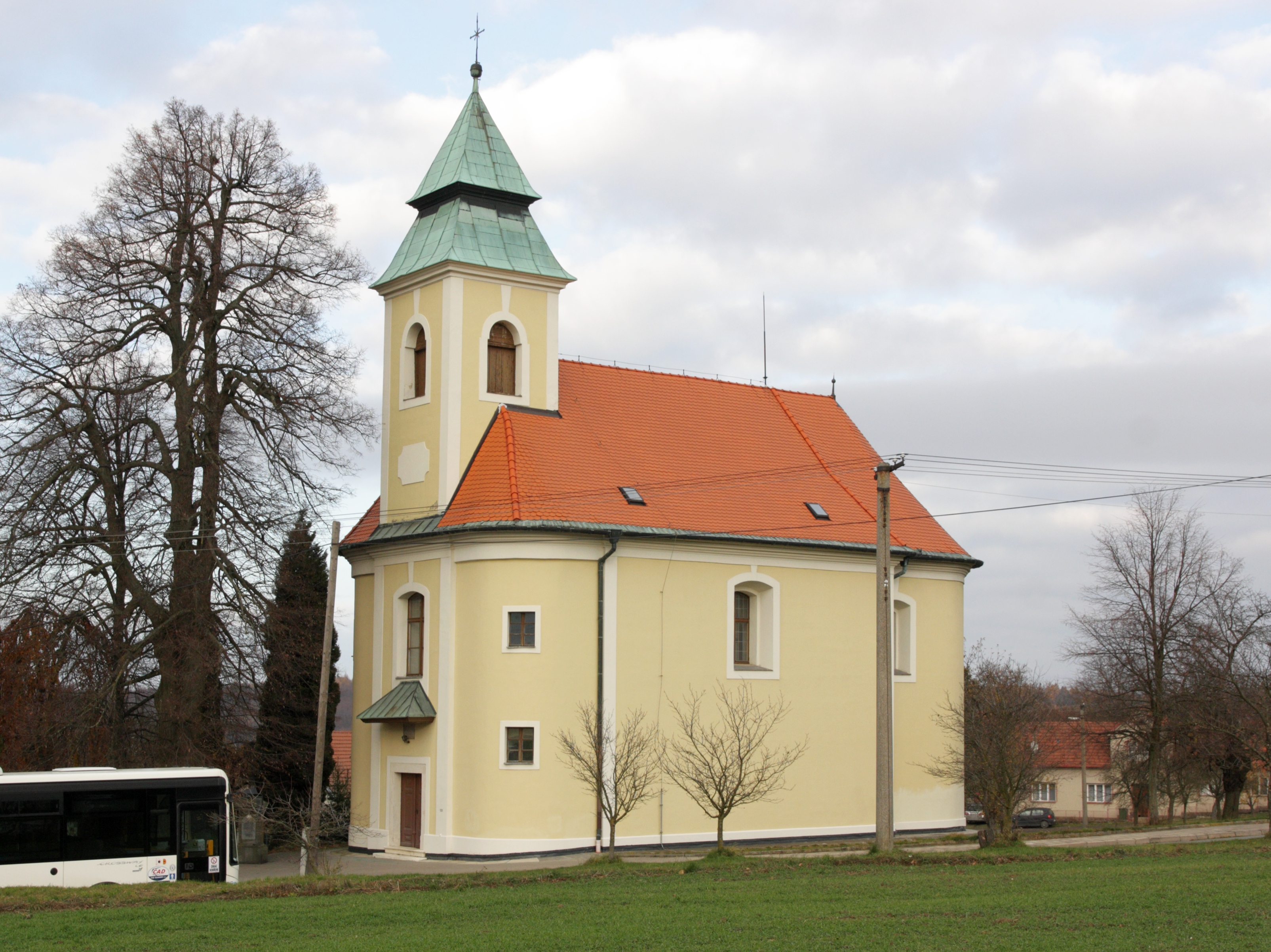 Bukovinka - kostel Nanebevzetí Panny Marie